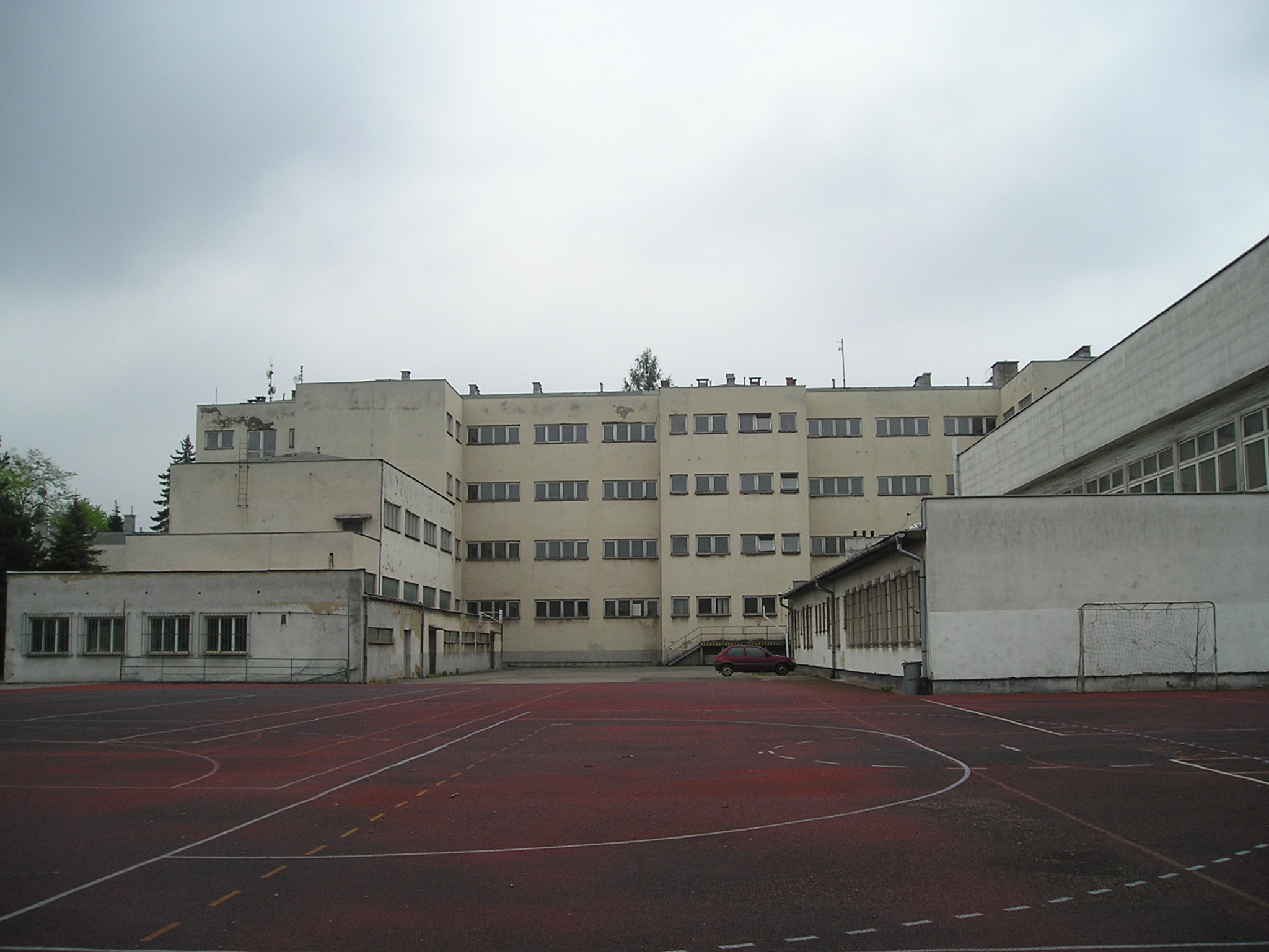 Building of Czech Gymnasium in Český Těšín